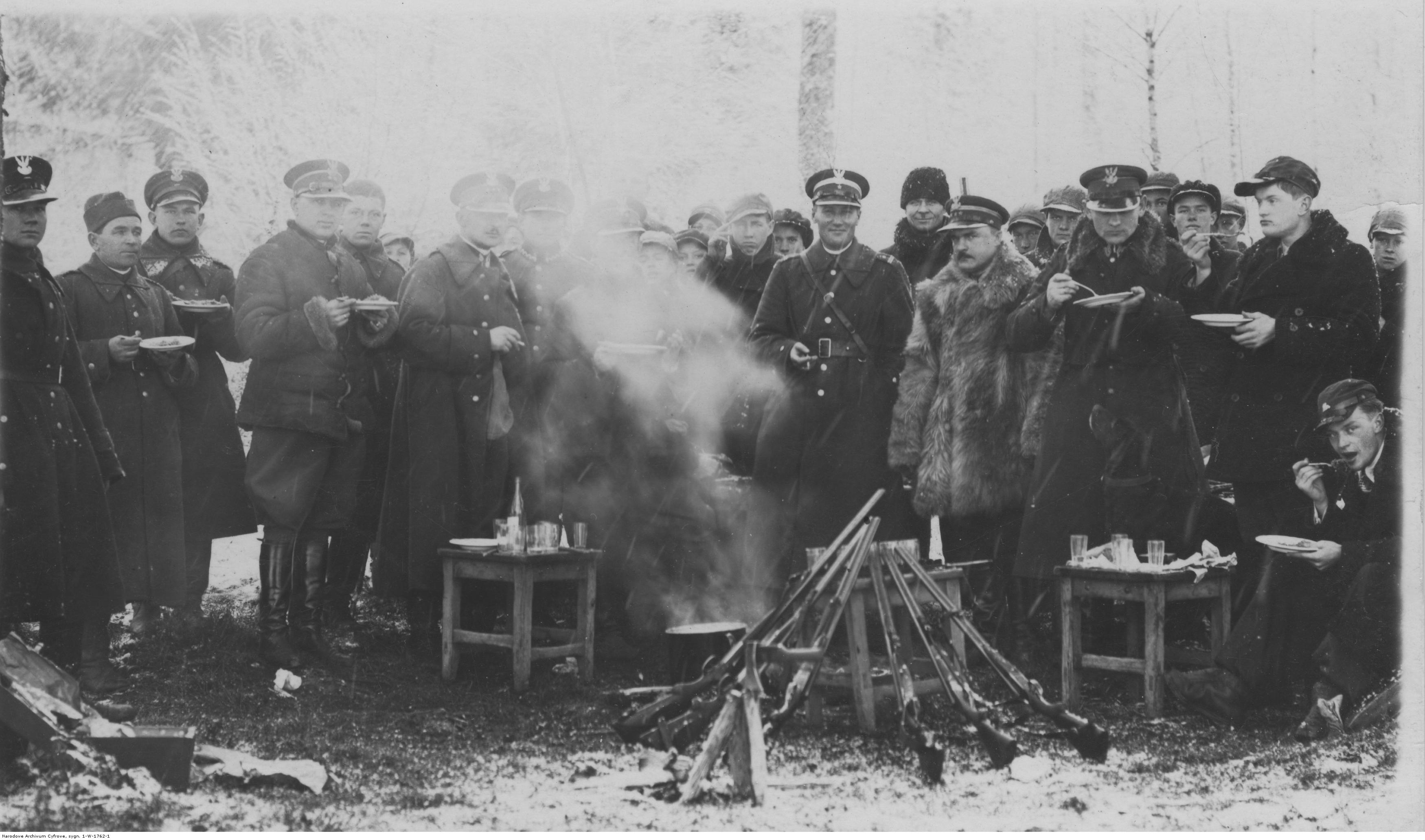 Oficerowie 27 Batalionu KOP-u podczas posiłku, przy ognisku po polowaniu. W futrze płk Jerzy Trojanowski, dowódca Brygady KOP "Nowogródek", obok niego major Rogowski, dowódca batalionu. Widoczne dubeltówki oparte o stołek. Koncern Ilustrowany Kurier Codzienny - Archiwum Ilustracji